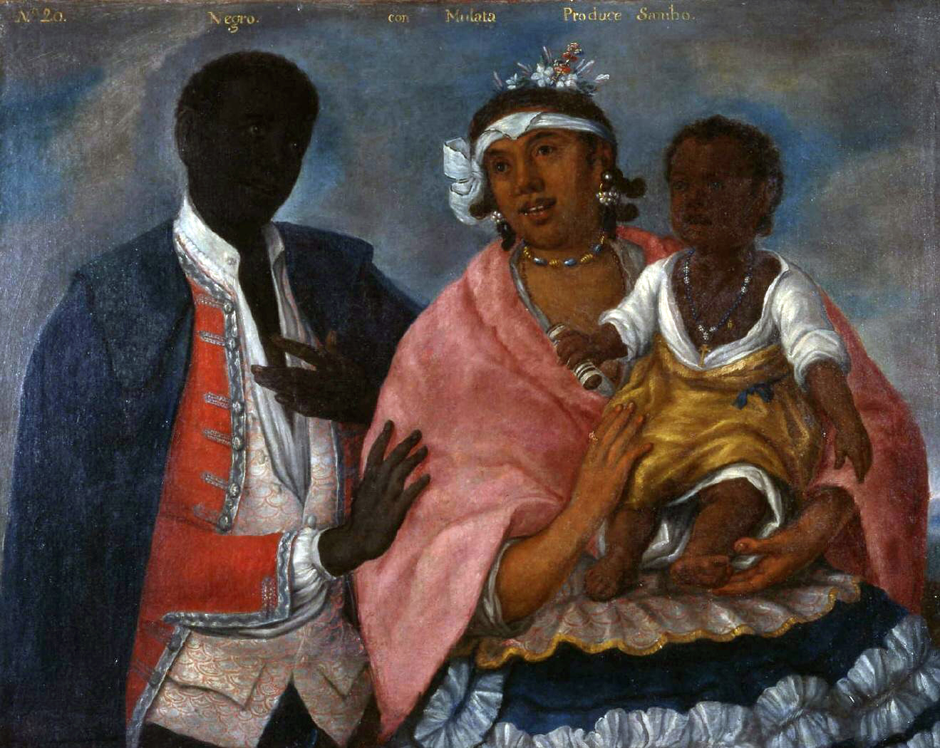 De la serie Los cuadros del mestizaje del Virrey Amat